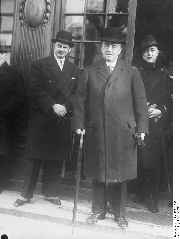 Die ersten Aufnahmen der Völkerbunds-Verhandlungen über den Polen-Conflikt in Genf! Der englische Aussenminister Henderson verlässt mit Mitgliedern seiner Deligation das Völkerbund-Palais.